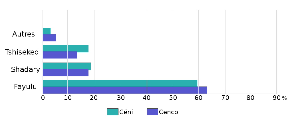 Diagramme des résultats de la présidentielle de 2018 en RDC, fuités auprès de RFI, du Financial Times et de TV5 Monde, et analysés en collaboration avec l'institut Groupe d’études sur le Congo.